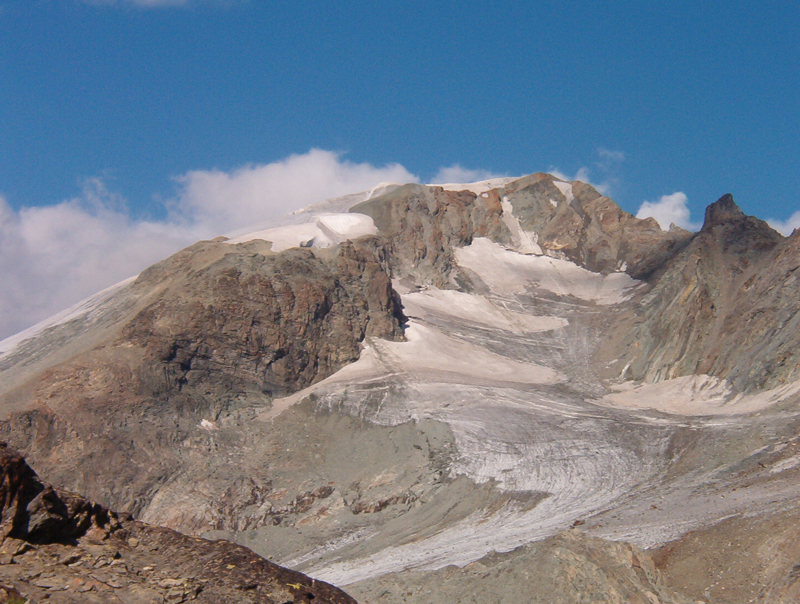 Punta Kurz - Alpi Pennine